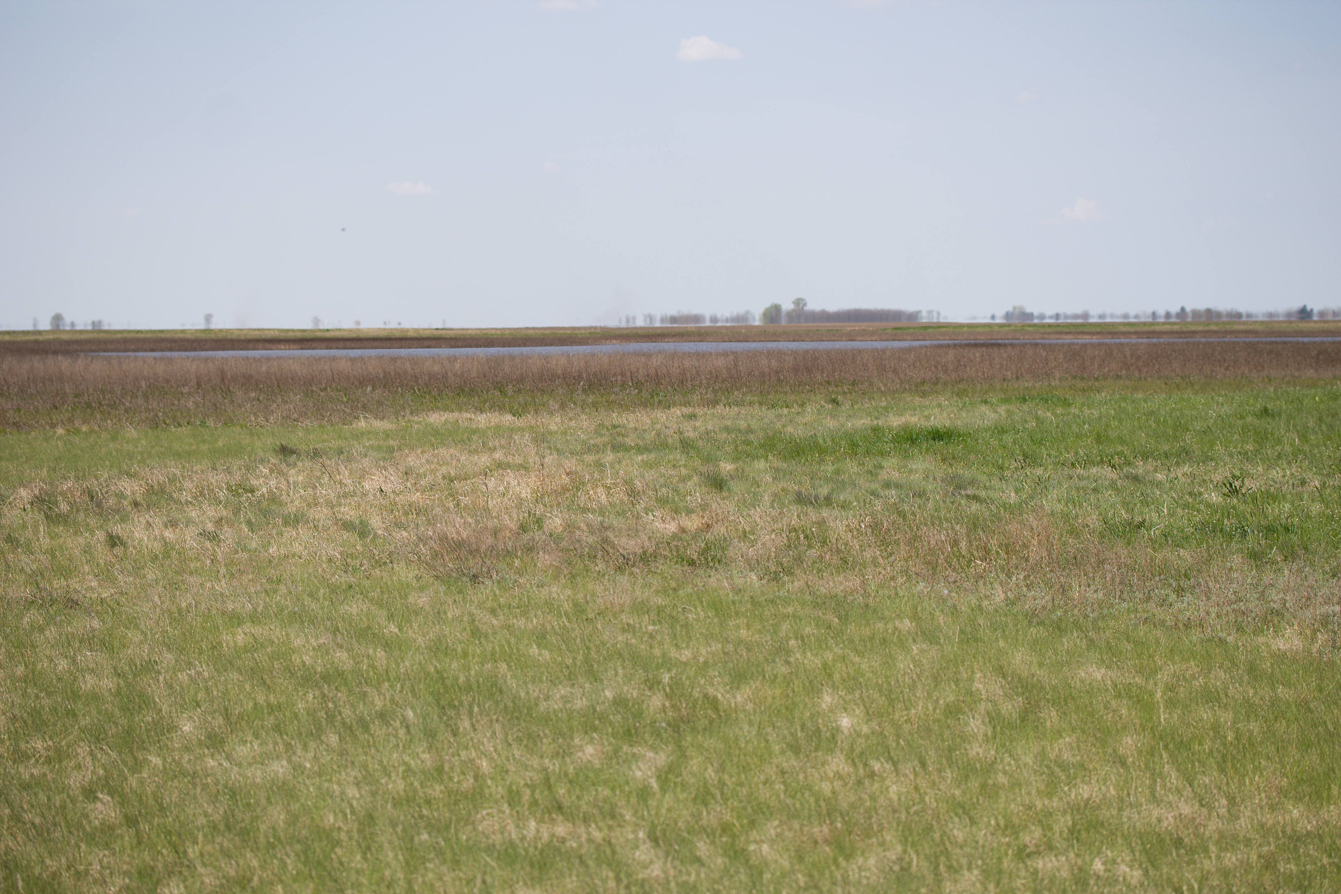 Slatinsko stanište kod sela Kruševlje.